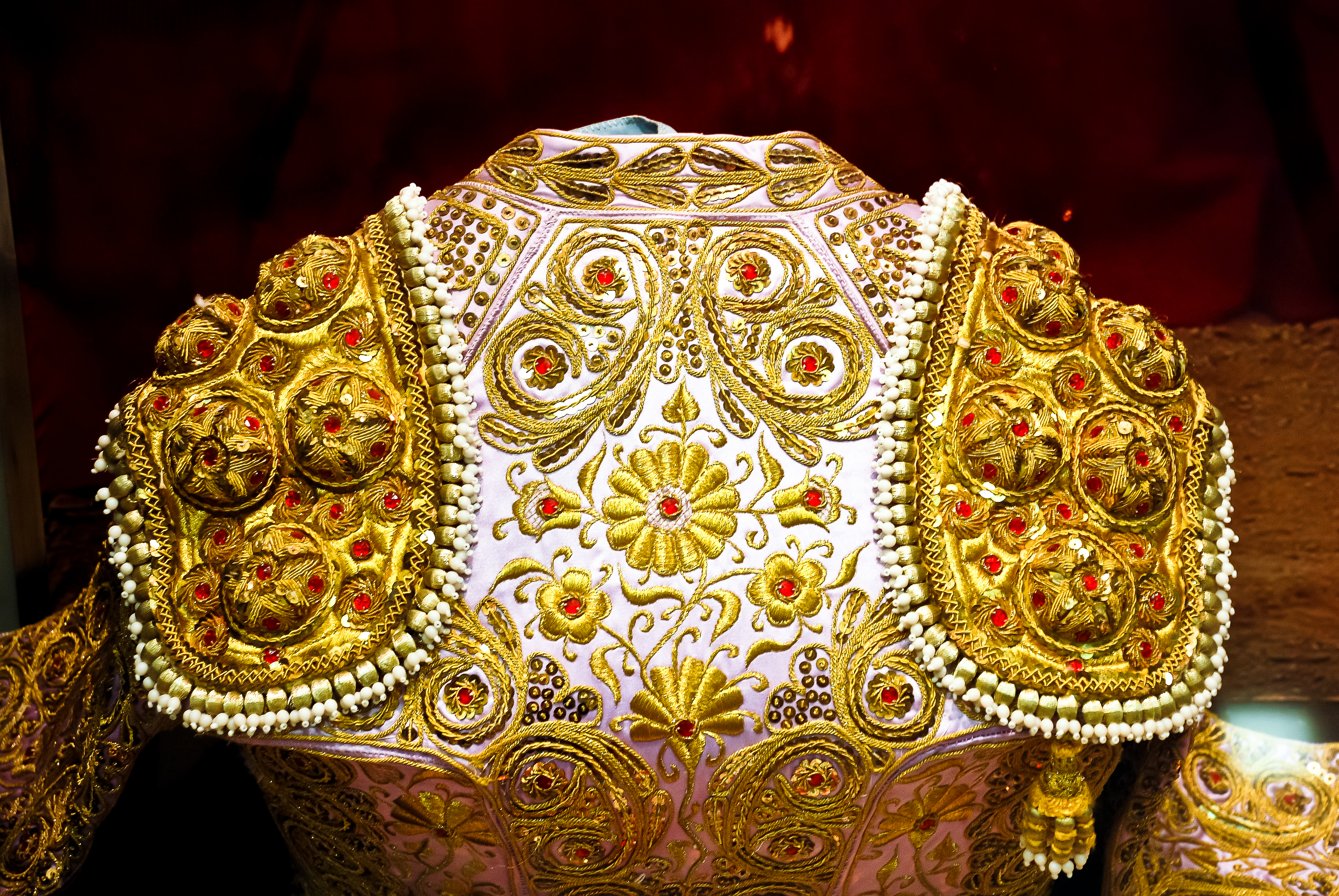 Museo Taurino de Córdoba (España).